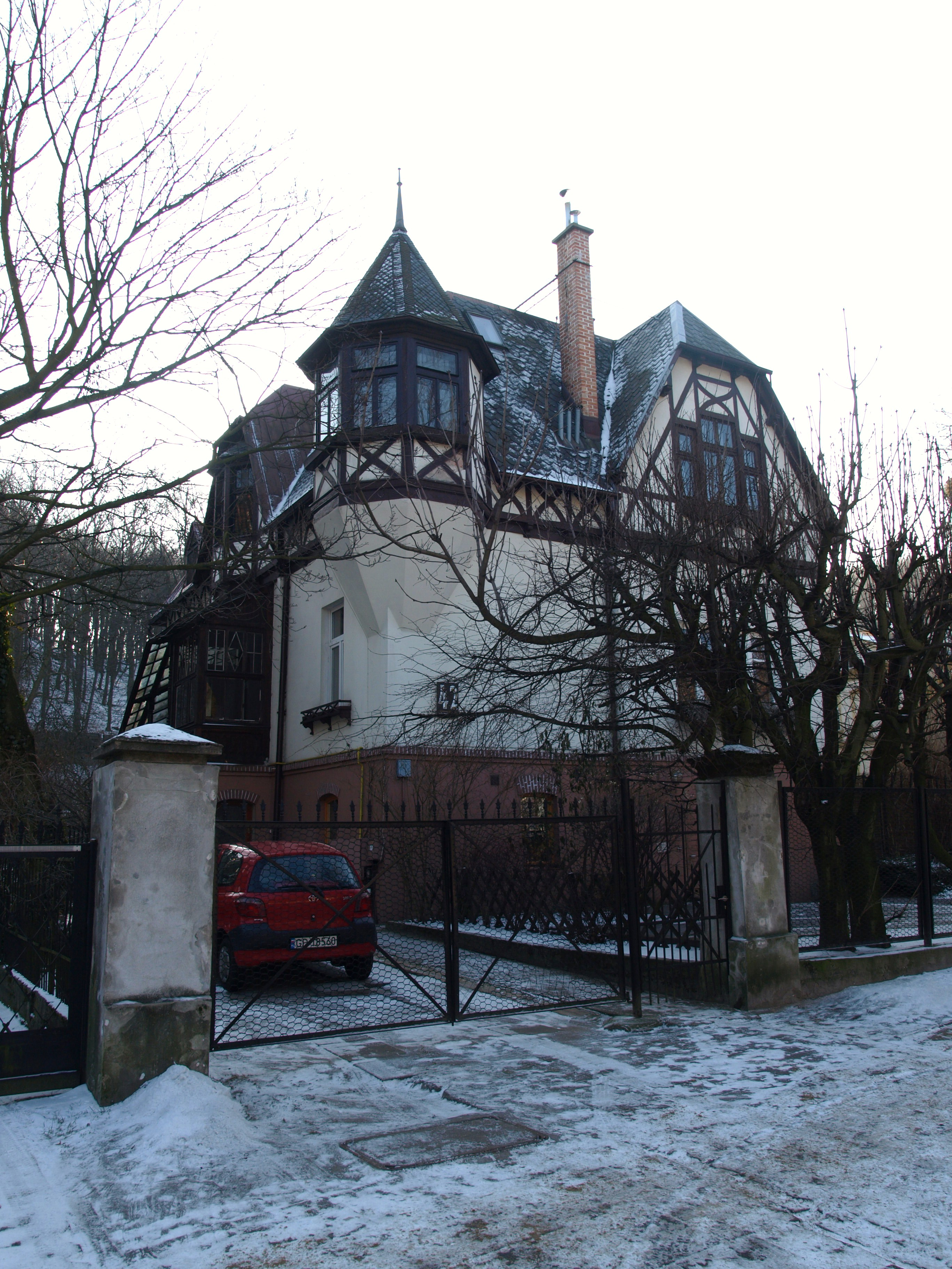 Gdańsk Wrzeszcz Górny, ul. Jaśkowa Dolina 42.